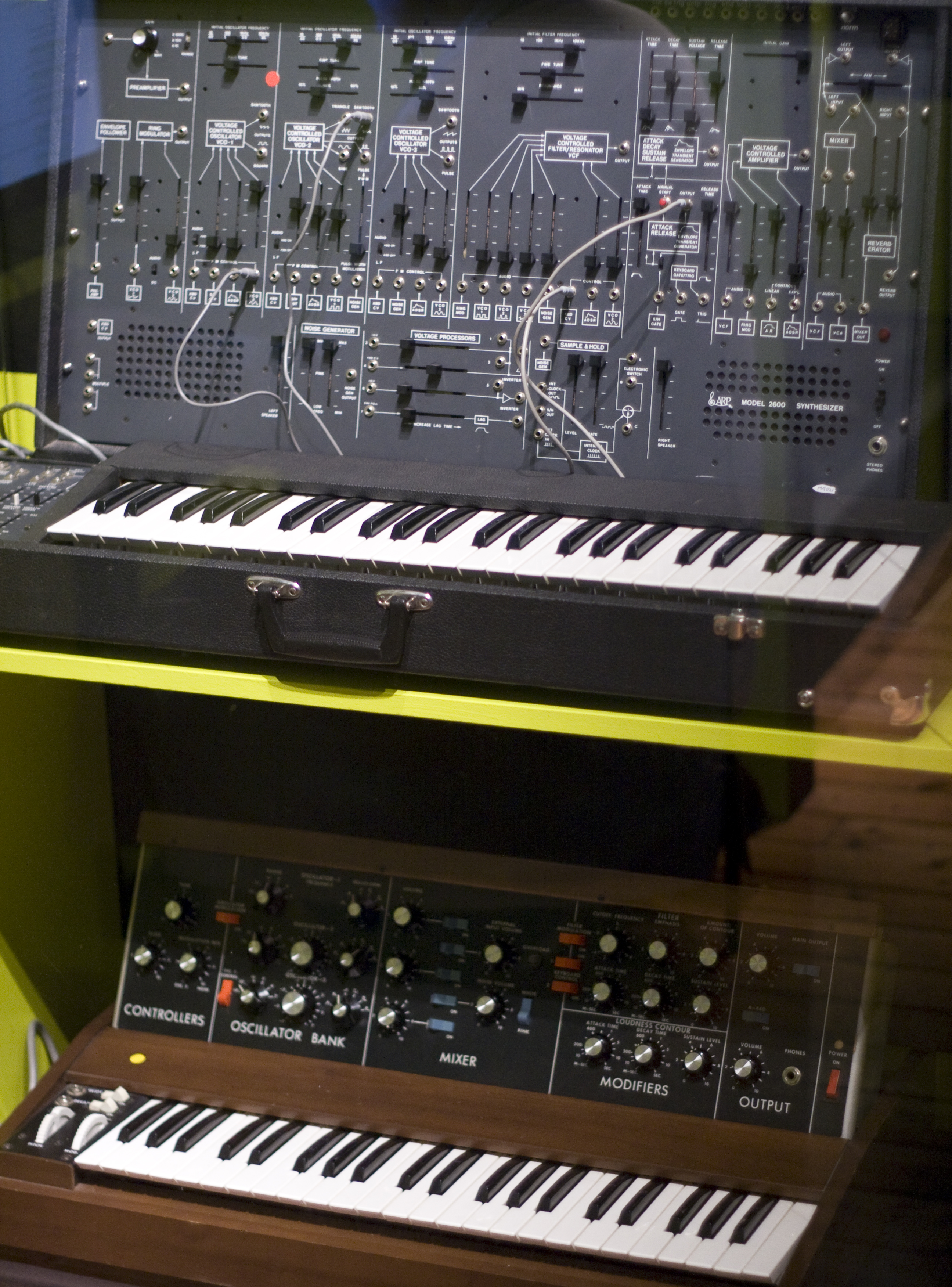 synthesizers at Musik- och teatermuseet in Stockholm.